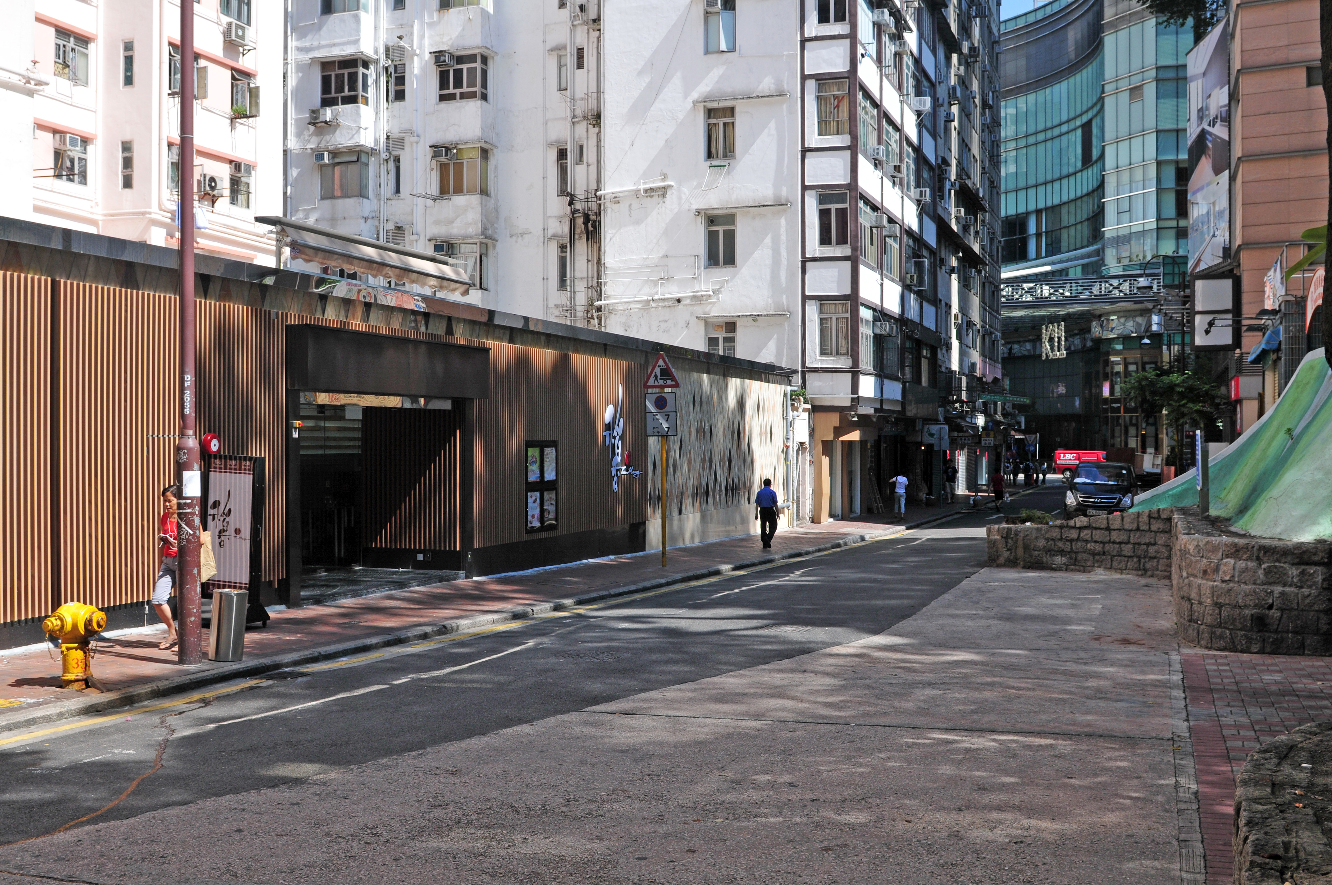 Wikimania 2013 Hongkong